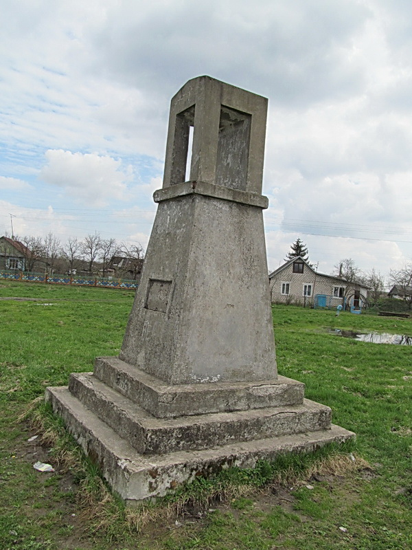 Пагарэльцы. Прыдарожная каплічка